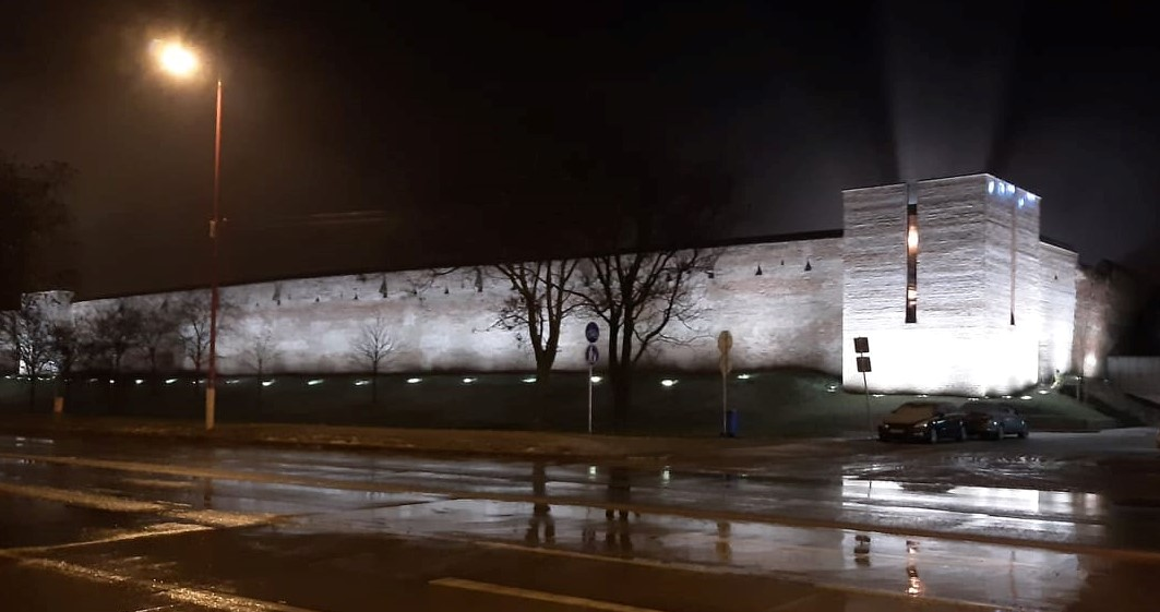 Nasvietený úsek trnavských hradieb